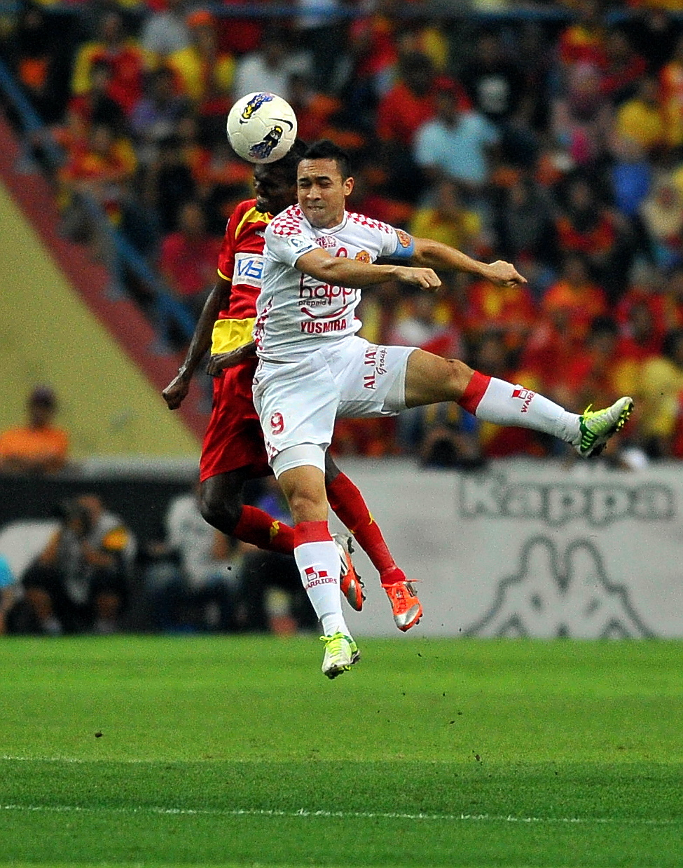 Mohd Haris Safwan Mohd Kamal - Malaysia Cup 2012 semi-finals Kelantan VS Selangor